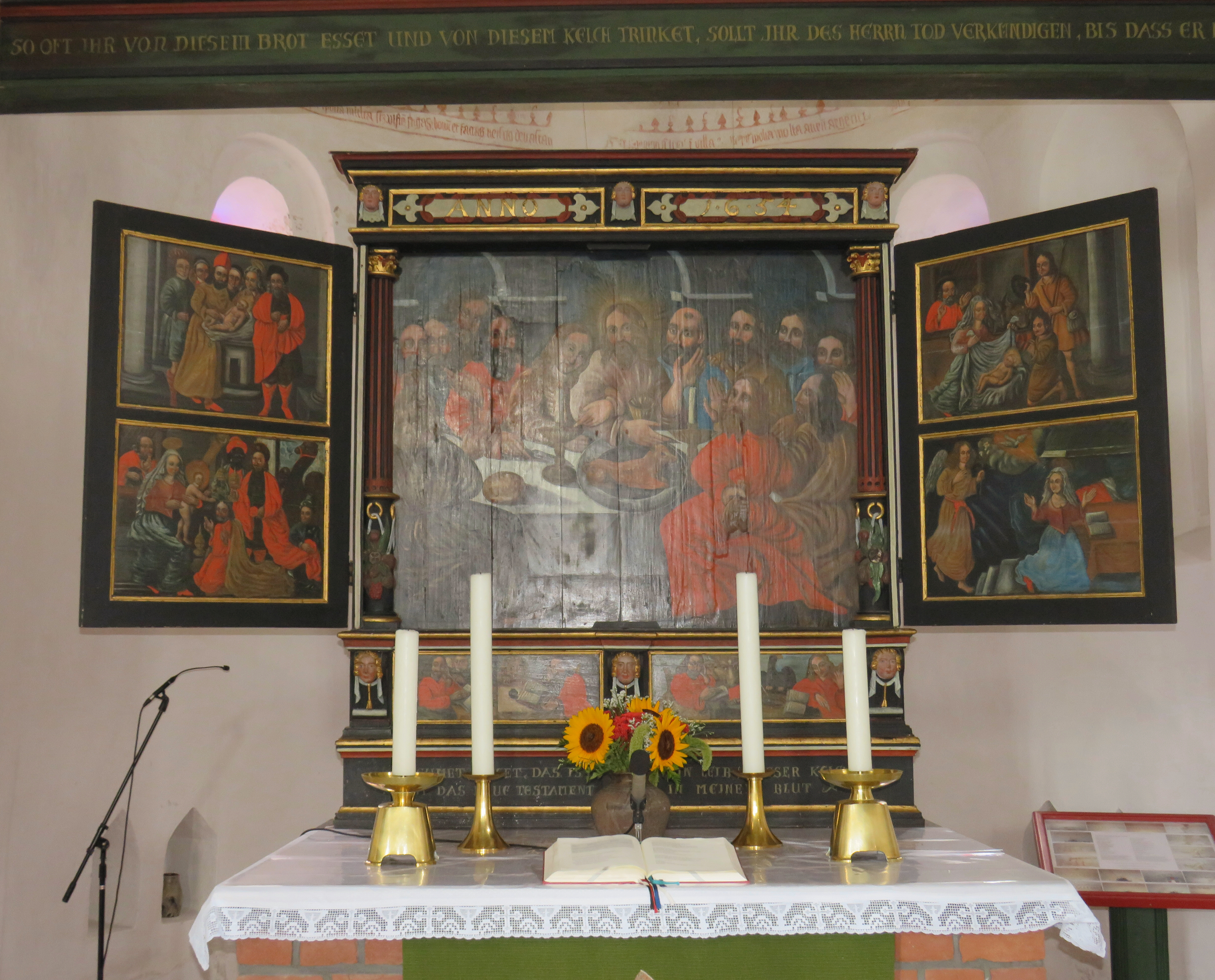 Barbara-Kirche (Strackholt) Altarretabel